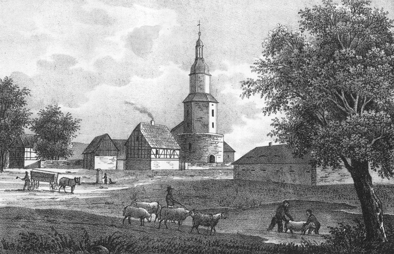 Dorfkirche Knautnaundorf, um 1850